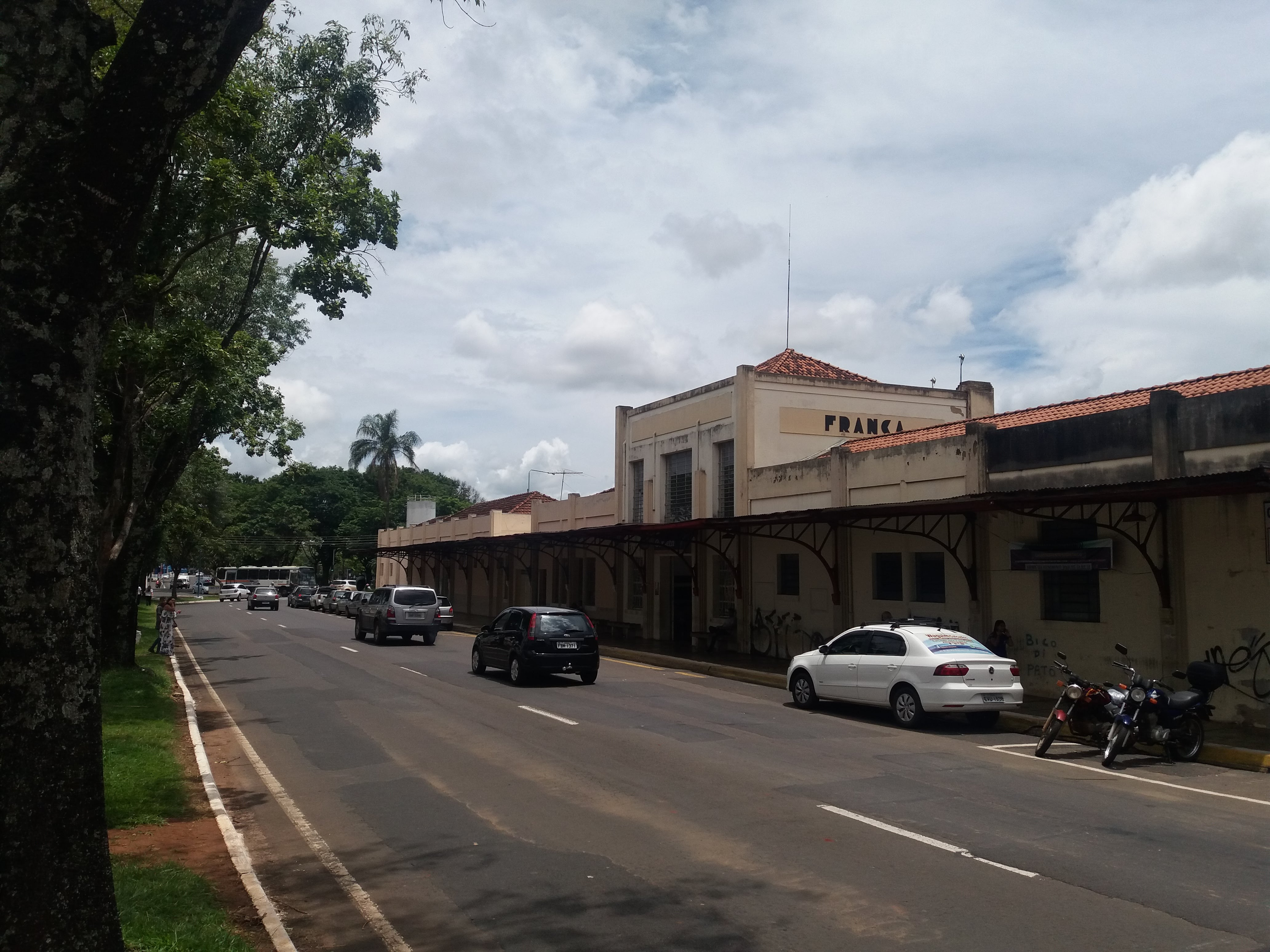 Antiga Estação Ferroviária, Franca (SP), Brazil